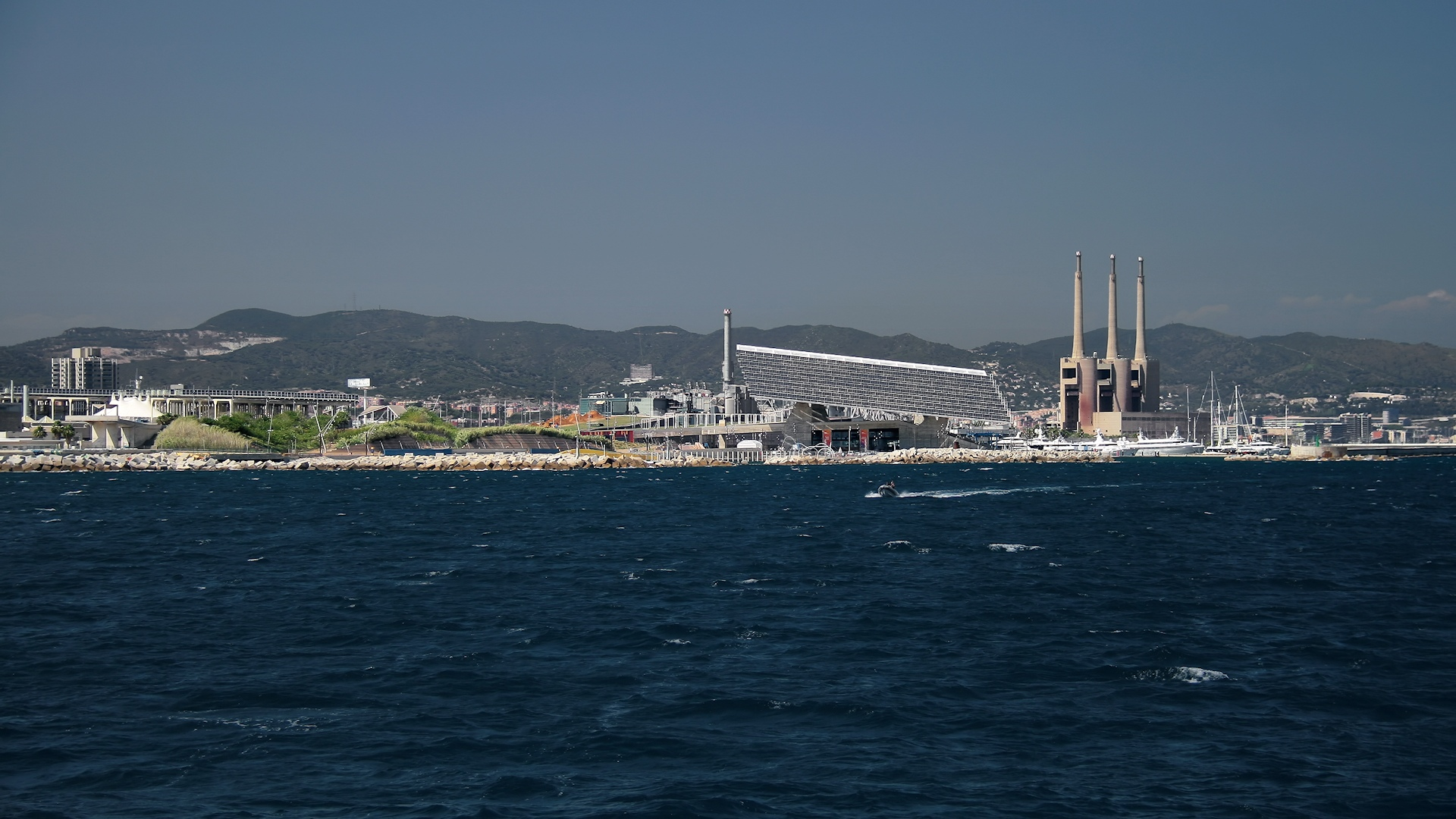 Barcelona desde el mar